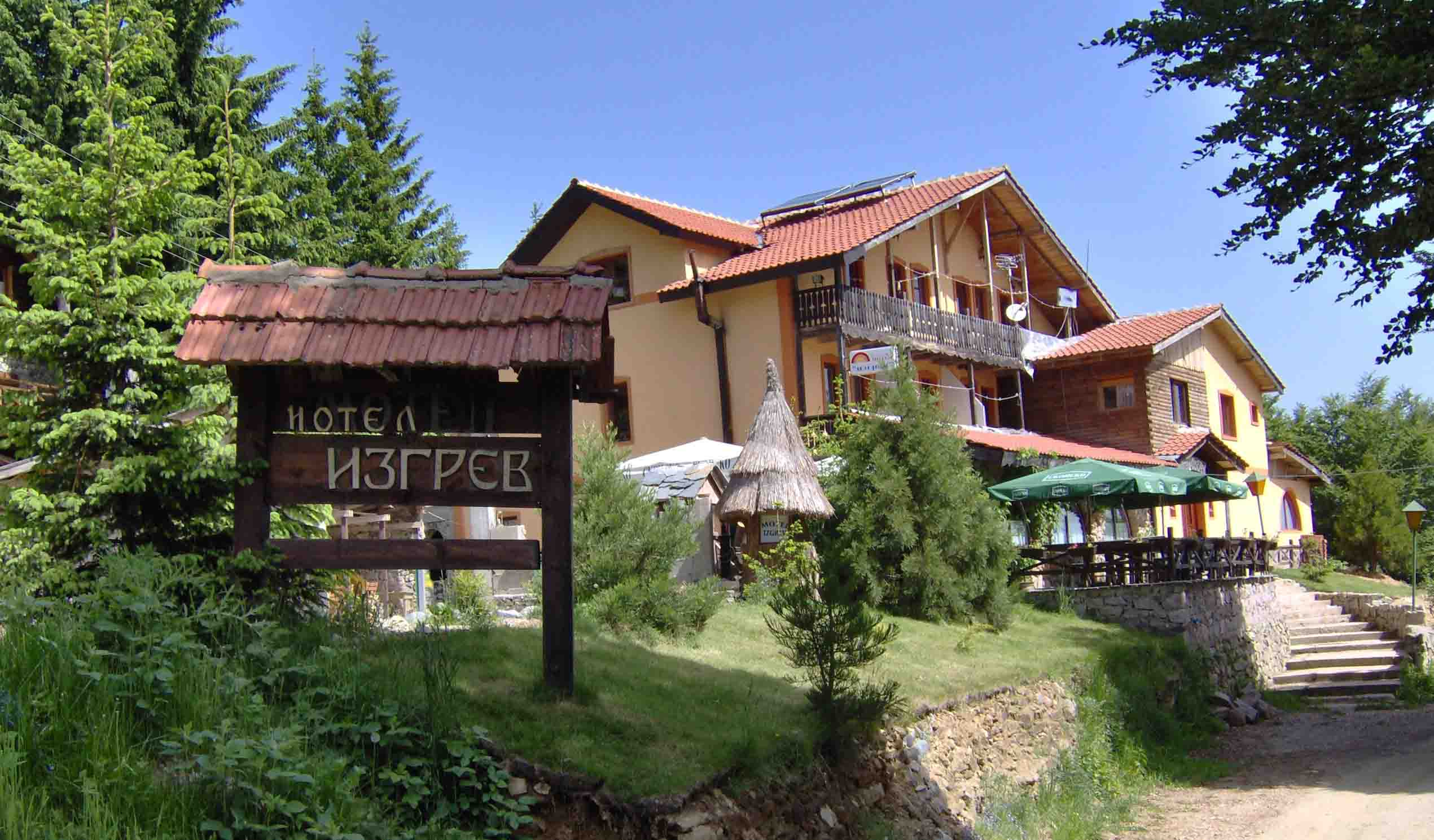 Мотел “Изгрев“ - Пониква, Осоговски Планини, Macedonia